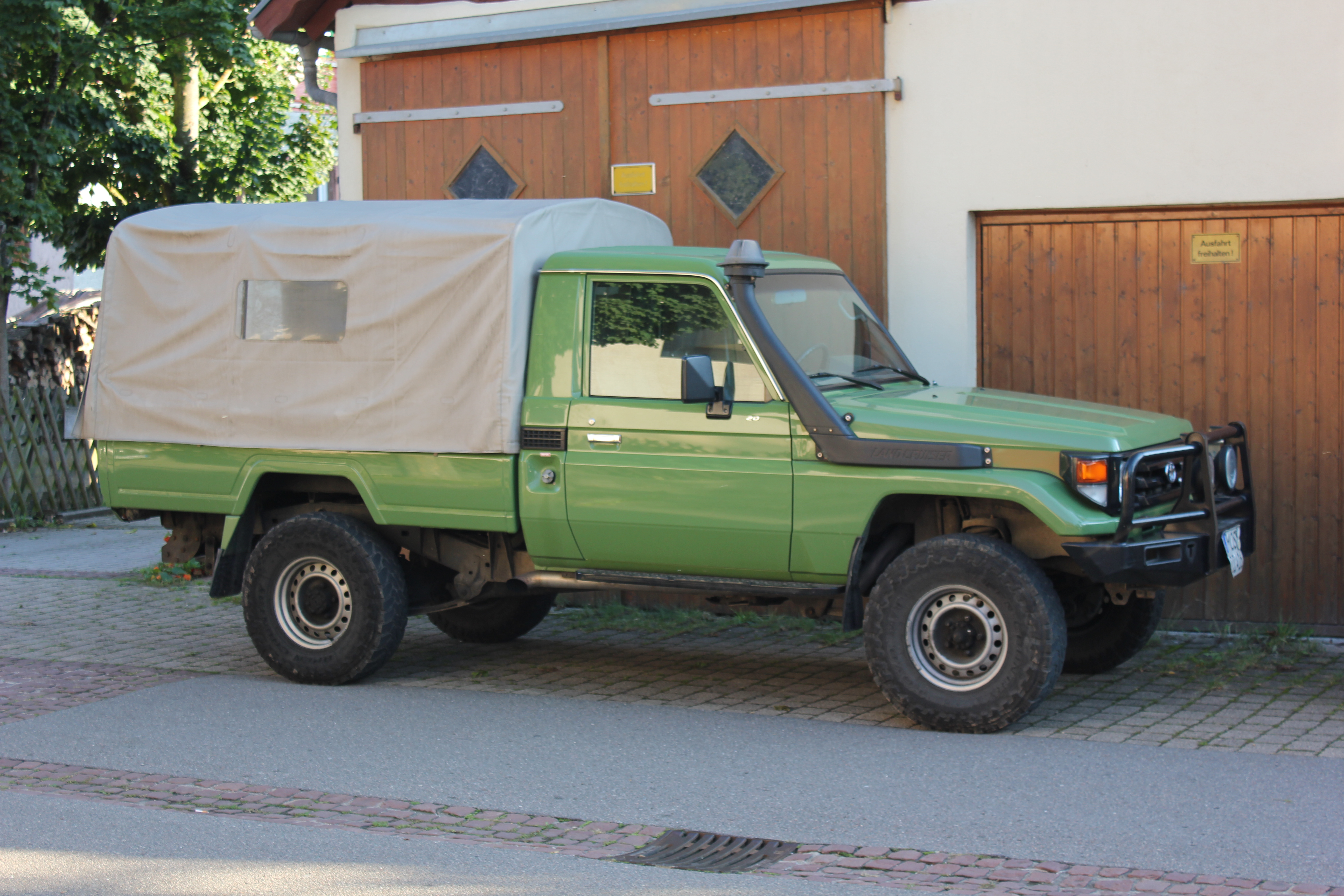 Toyota Landcruiser Pickup